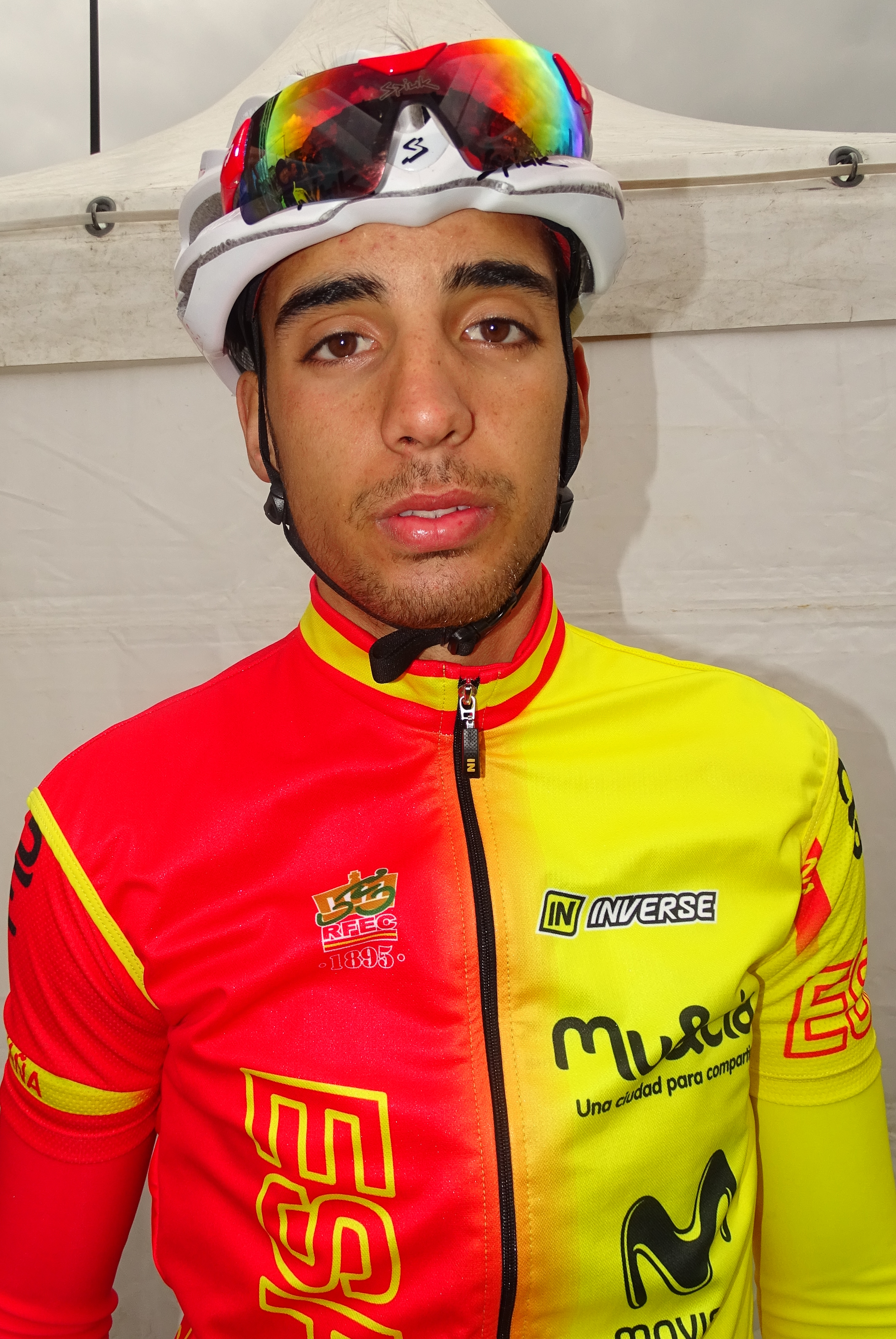 Reportage réalisé le samedi 11 avril à l'occasion du départ et de l'arrivée du Tour des Flandres espoirs 2015 à Audenarde, Belgique.